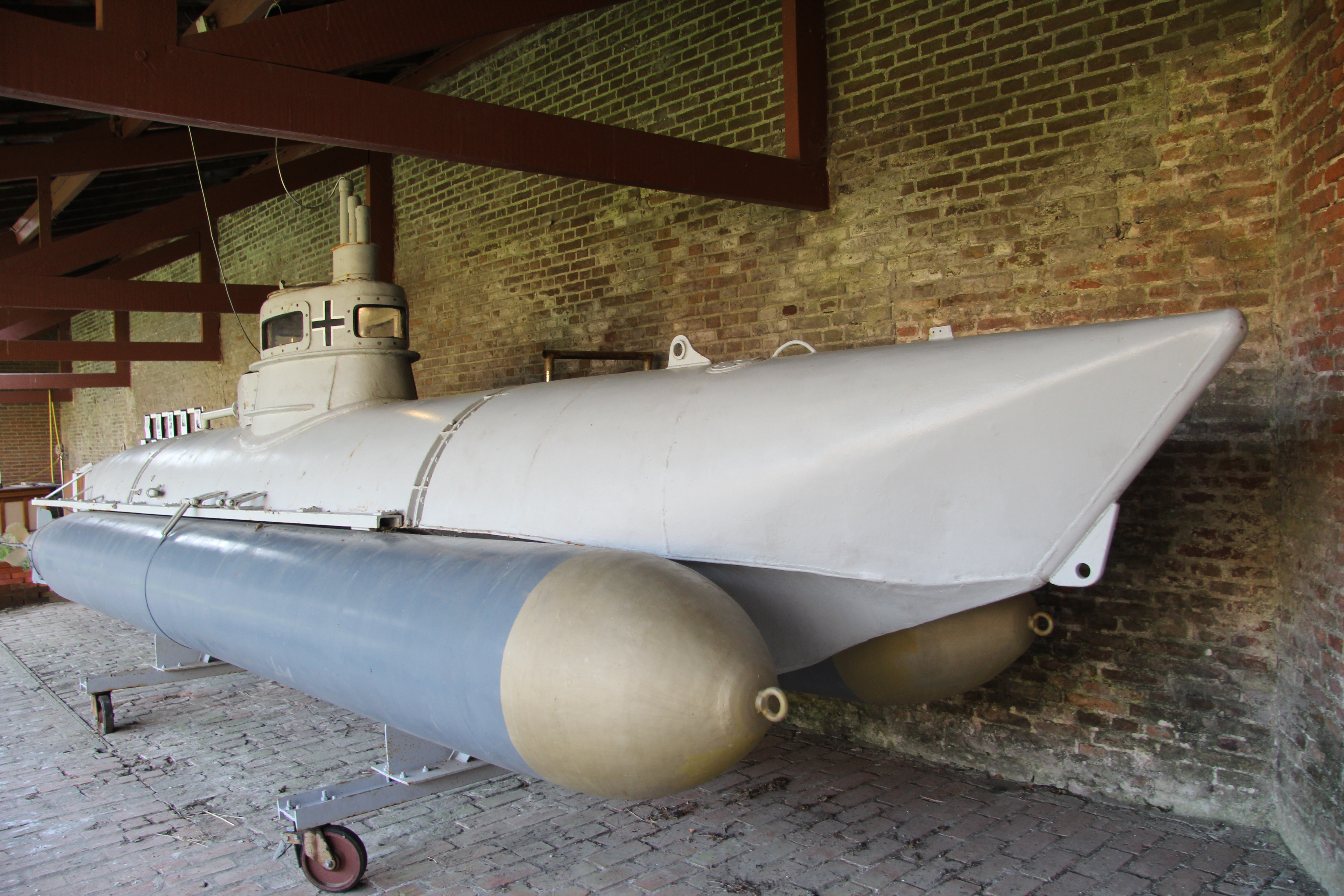 Biber in Fort Rammekens - voorzijde